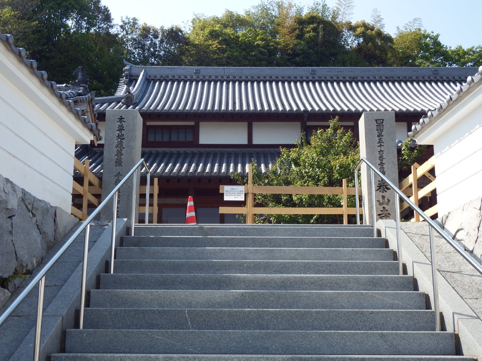 泰山寺の入口が封鎖された閉山となる